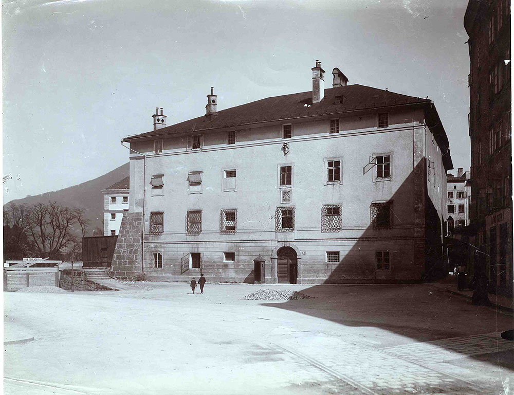 Salzburg, Kajetanerplatz Nr. 2, Fronfeste Stockhaus (Vorgängerbau der Justizanstalt)